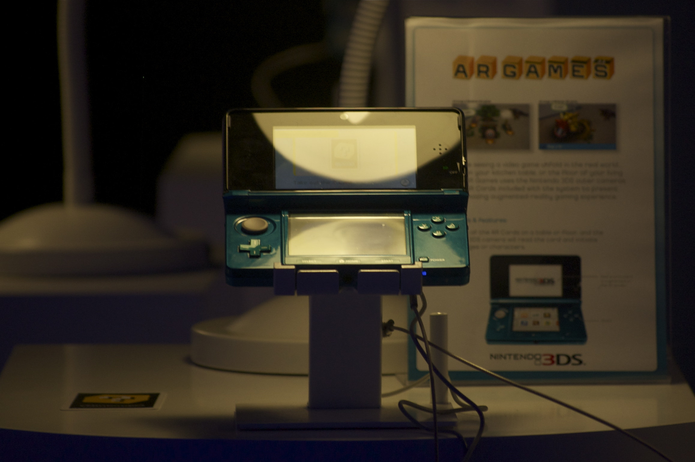 Nintendo 3DS Event